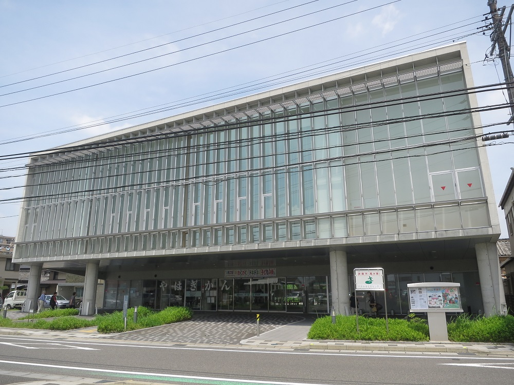 岡崎市西部地域交流センター・やはぎかん